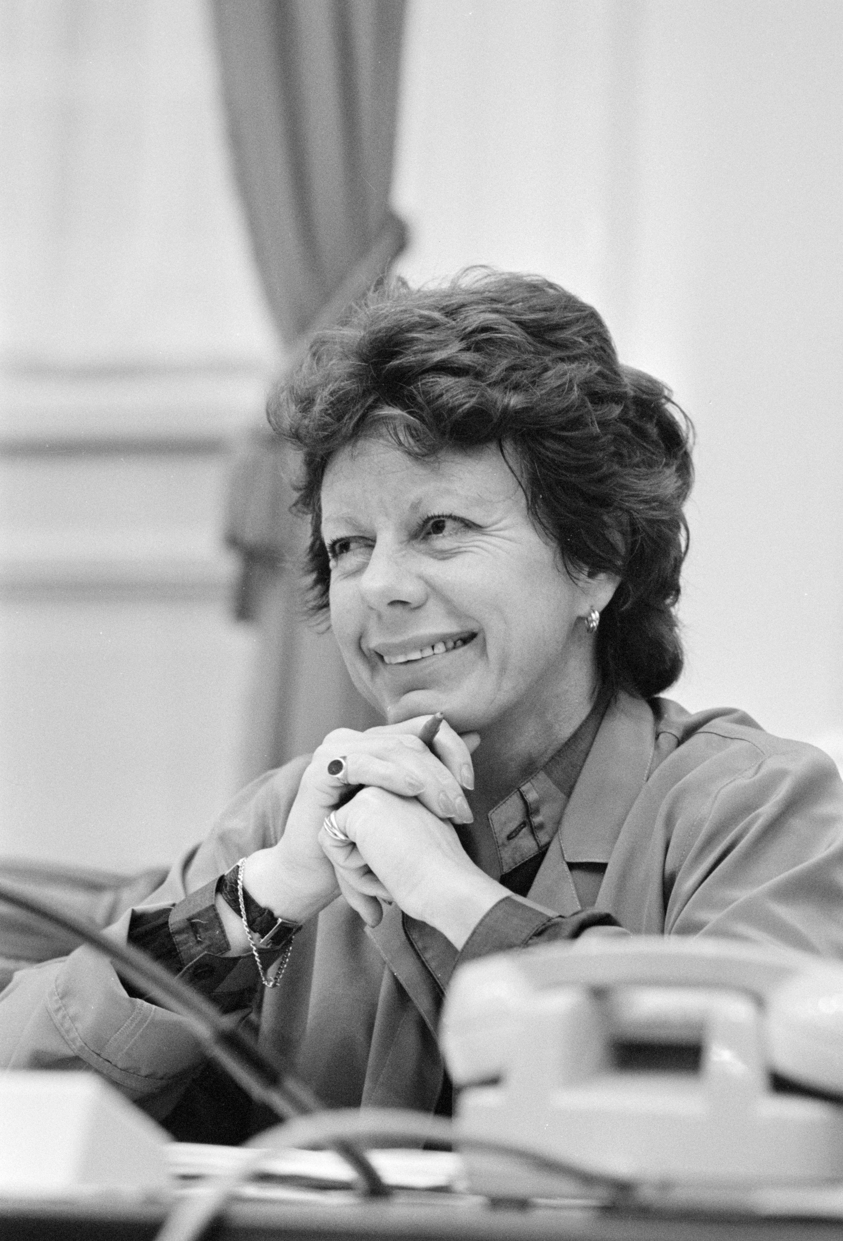 Nationaal Archief Beschrijving: Minister Smit-Kroes tijdens behandeling Oosterscheldedam Datum: 30 augustus 1984 Bestanddeelnummer NL-HaNA_Anefo_933-0604 Vervaardiger: Croes, Rob / Anefo URL: Voor meer informatie over het Nationaal Archief: Voor meer foto's uit deze en andere collecties, bezoek onze Beeldbank:, U kunt ons helpen onze kennis van de fotocollecties te verrijken door tags en commentaren toe te voegen. Herkent u mensen of locaties of heeft u een bijzonder verhaal te vertellen bij één van de foto's, laat dan een reactie achter (als u ingelogd bent bij Flickr) of stuur een mailtje naar